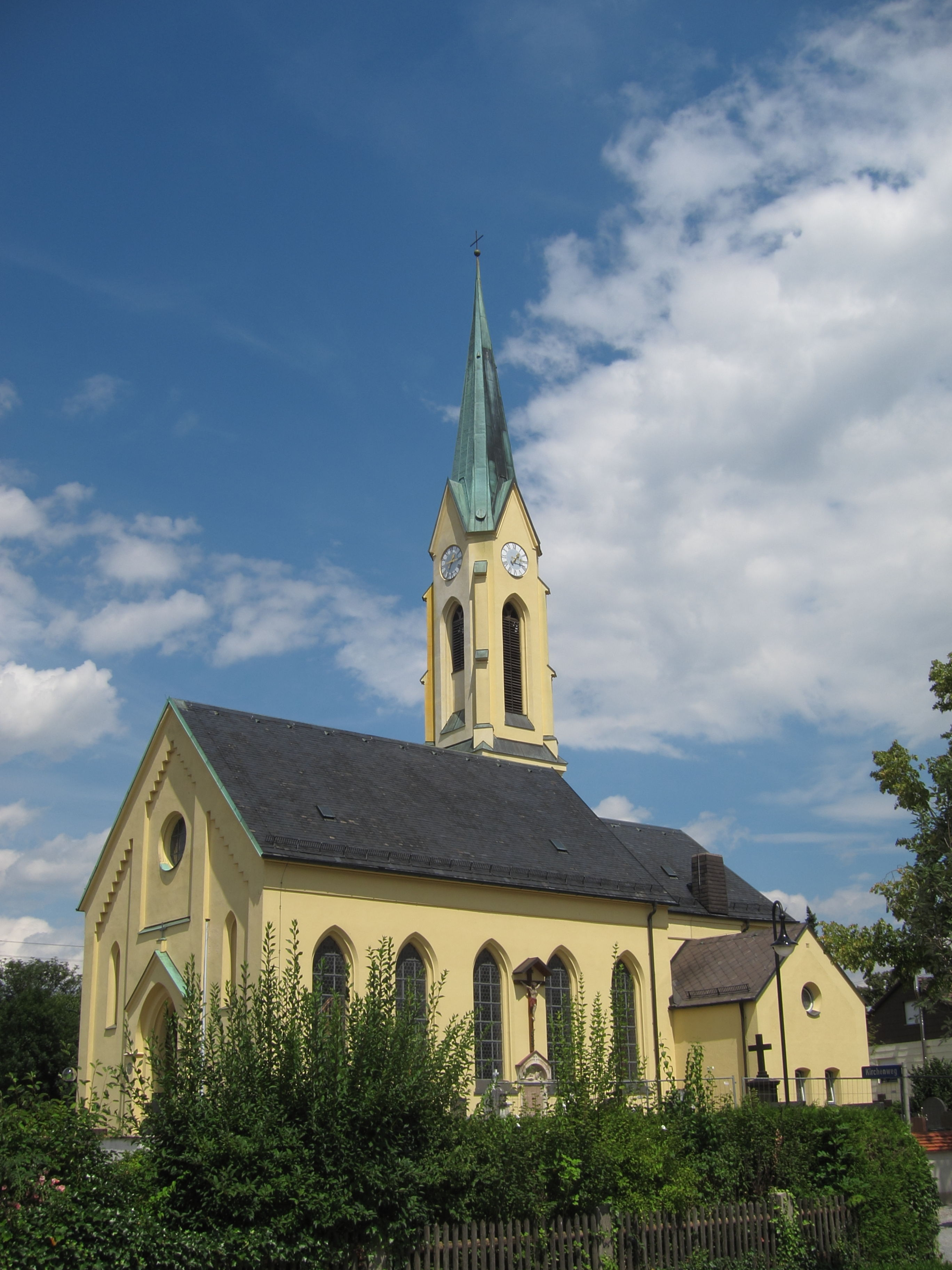 Neufarn, Münchener Straße 16; katholische Filialkirche St. Peter und Paul, neugotischer Bau, 1868; mit Ausstattung.